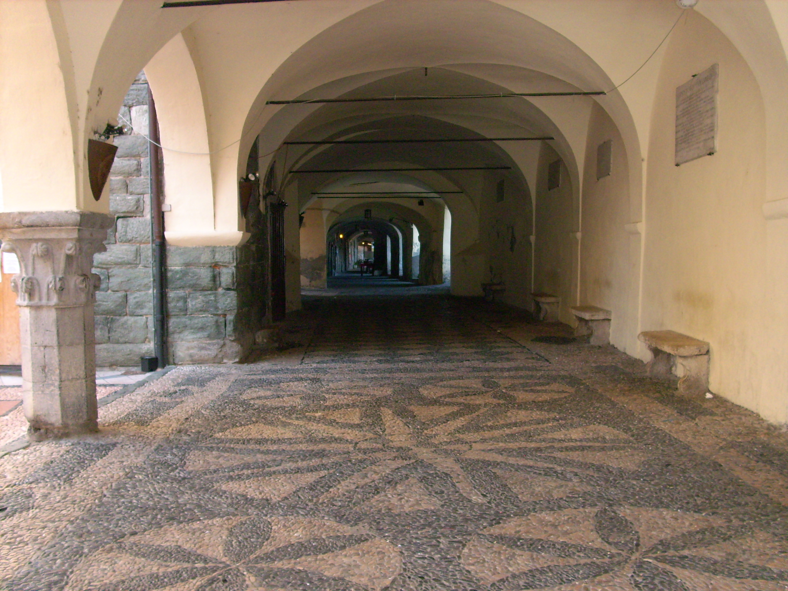 Portico del Palazzo della Repubblica di Noli, Liguria, Italy